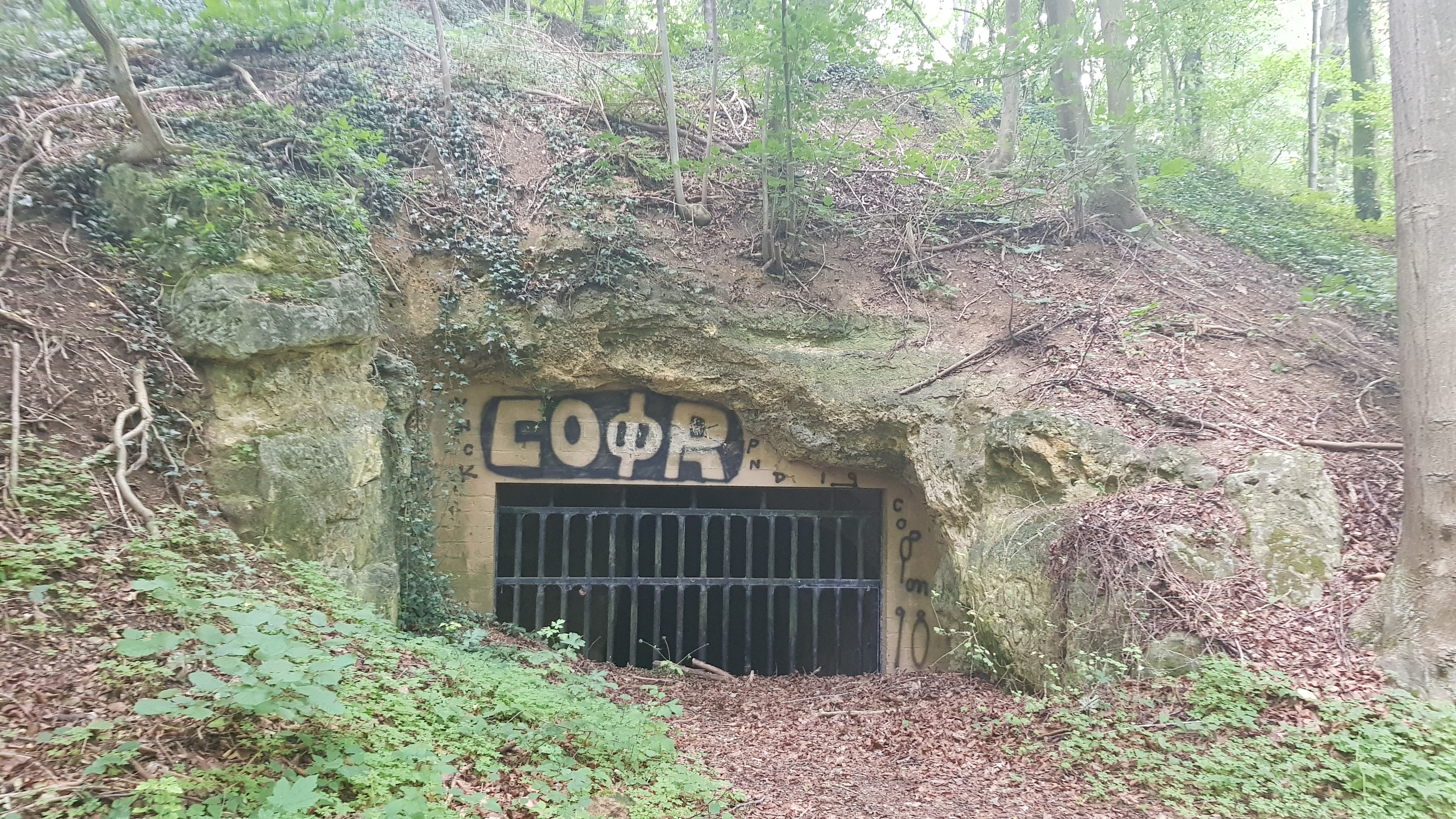 Kleinberggroeve Noord in Savelsbos, Gronsveld, Nederland